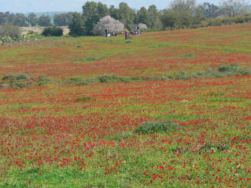 מרבד כלניות באור הנר Anemone coronaria in Or HaNer, Israel